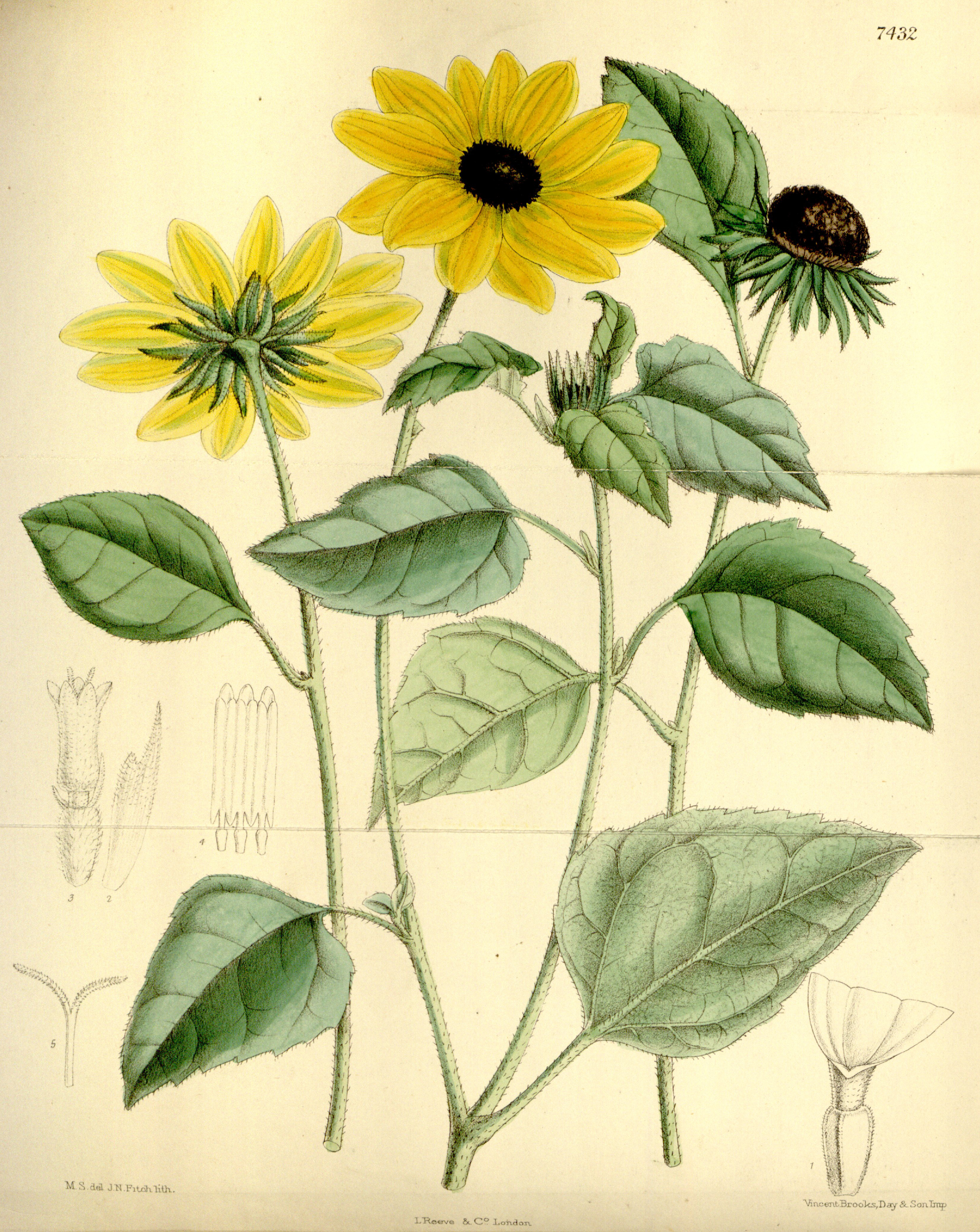 Legende: Obere Teile der Pflanze. 1 Strahlenblüte, Zunge teilweise entfernt. 2 Spreublatt. 3 Röhrenblüte. 4 Staubblätter. 5 Griffelspitze.